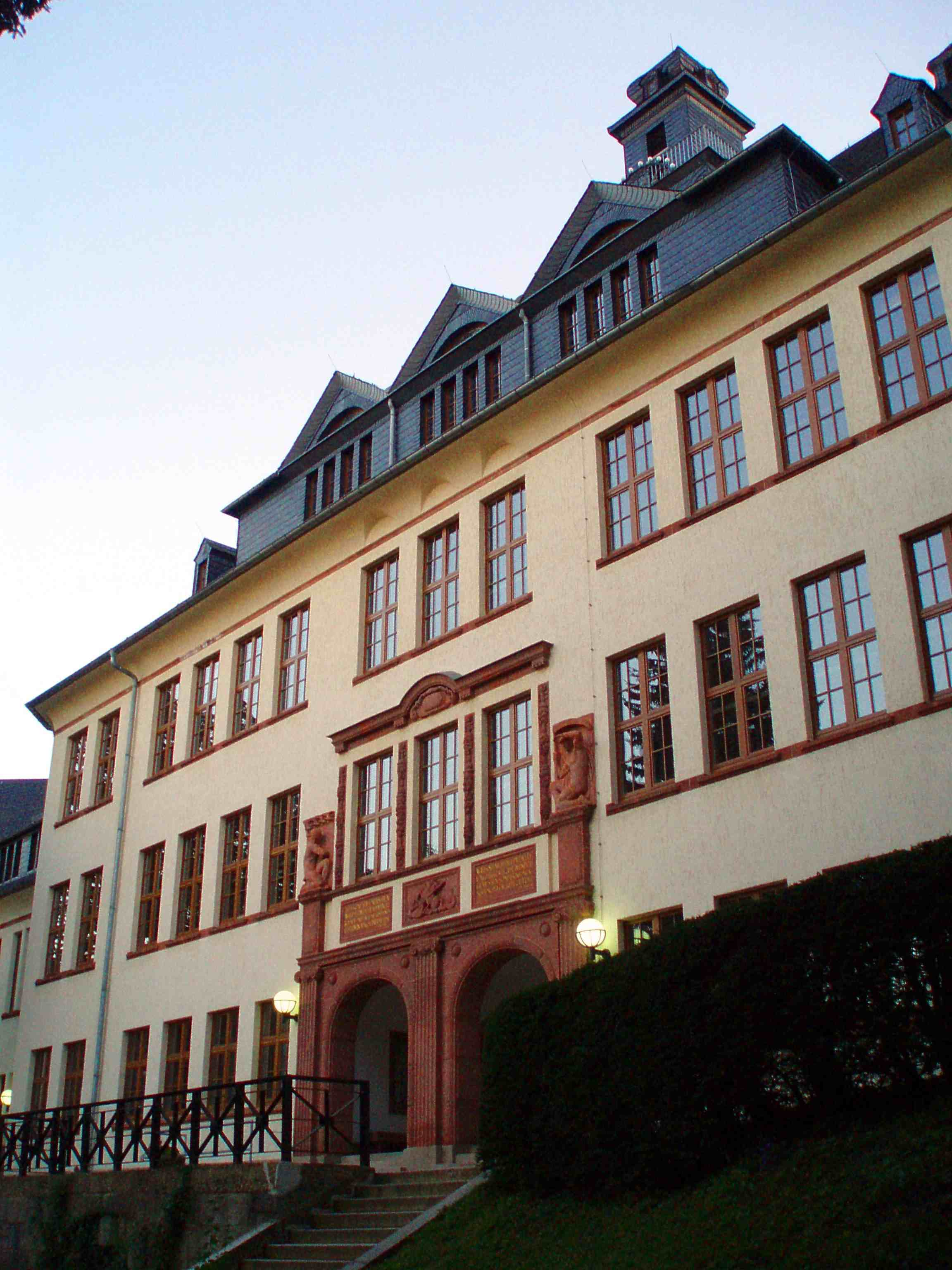 Bertolt-Brecht-Gymnasium in Schwarzenberg (Erzgebirge), Sachsen, Bermsgrüner Straße 2; erbaut 1914-1916 nach Entwurf von Oswin Hempel; unter Denkmalschutz